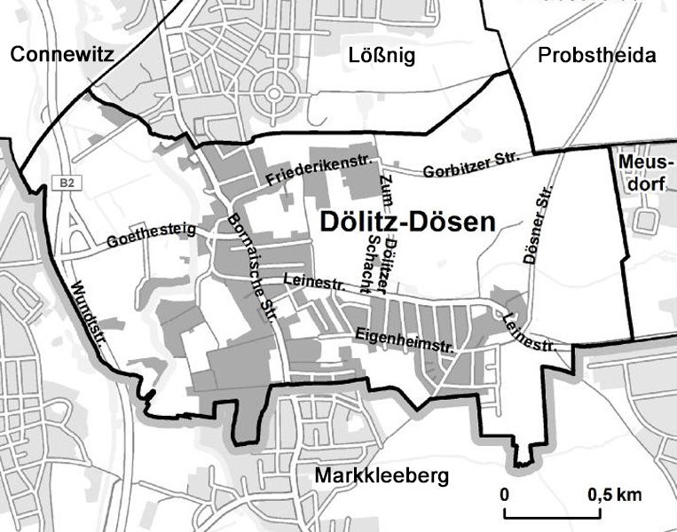 Der Leipziger Ortsteil Dölitz-Dösen und seine Nachbarn